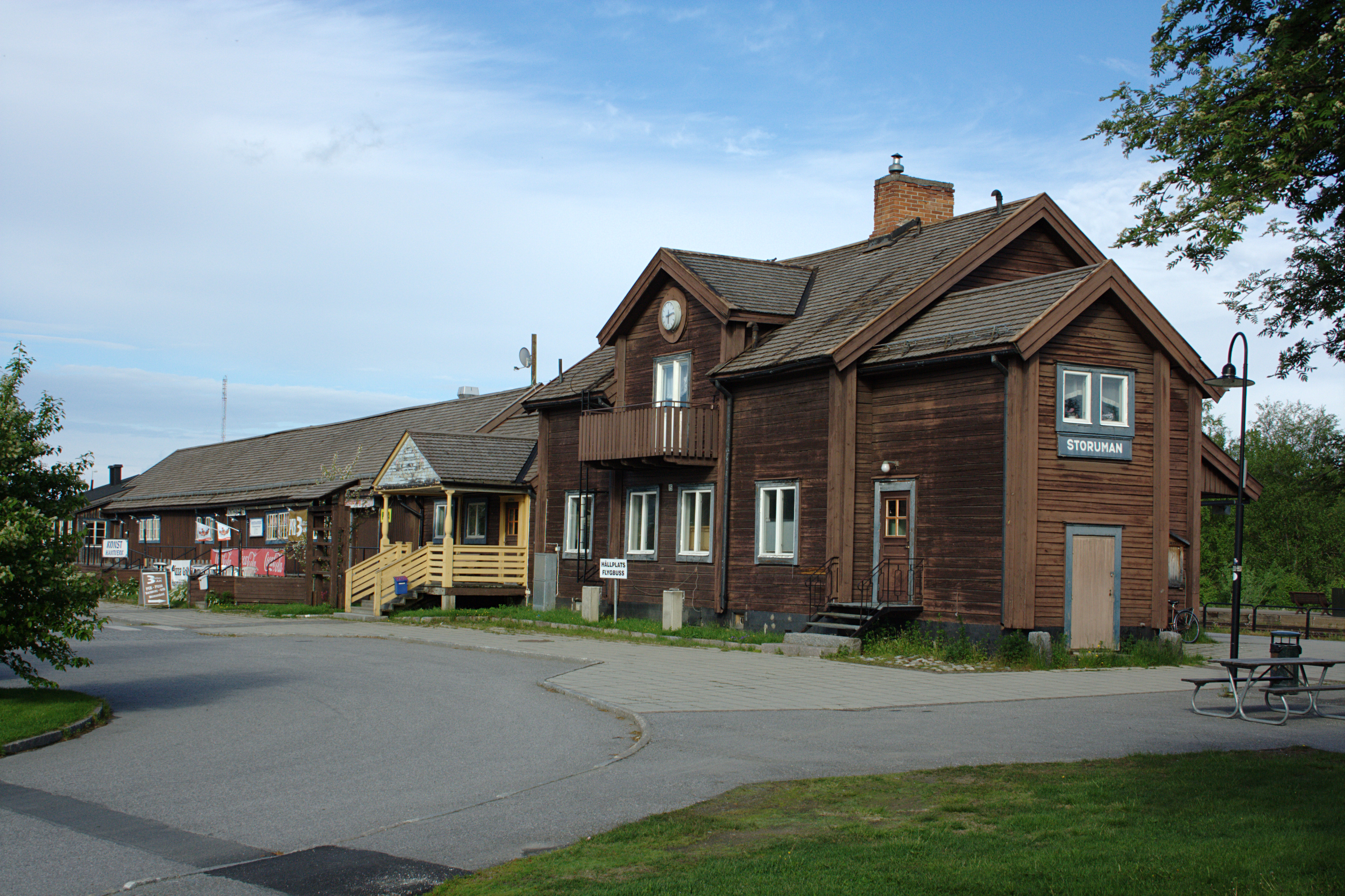 Stationshuset i Storuman